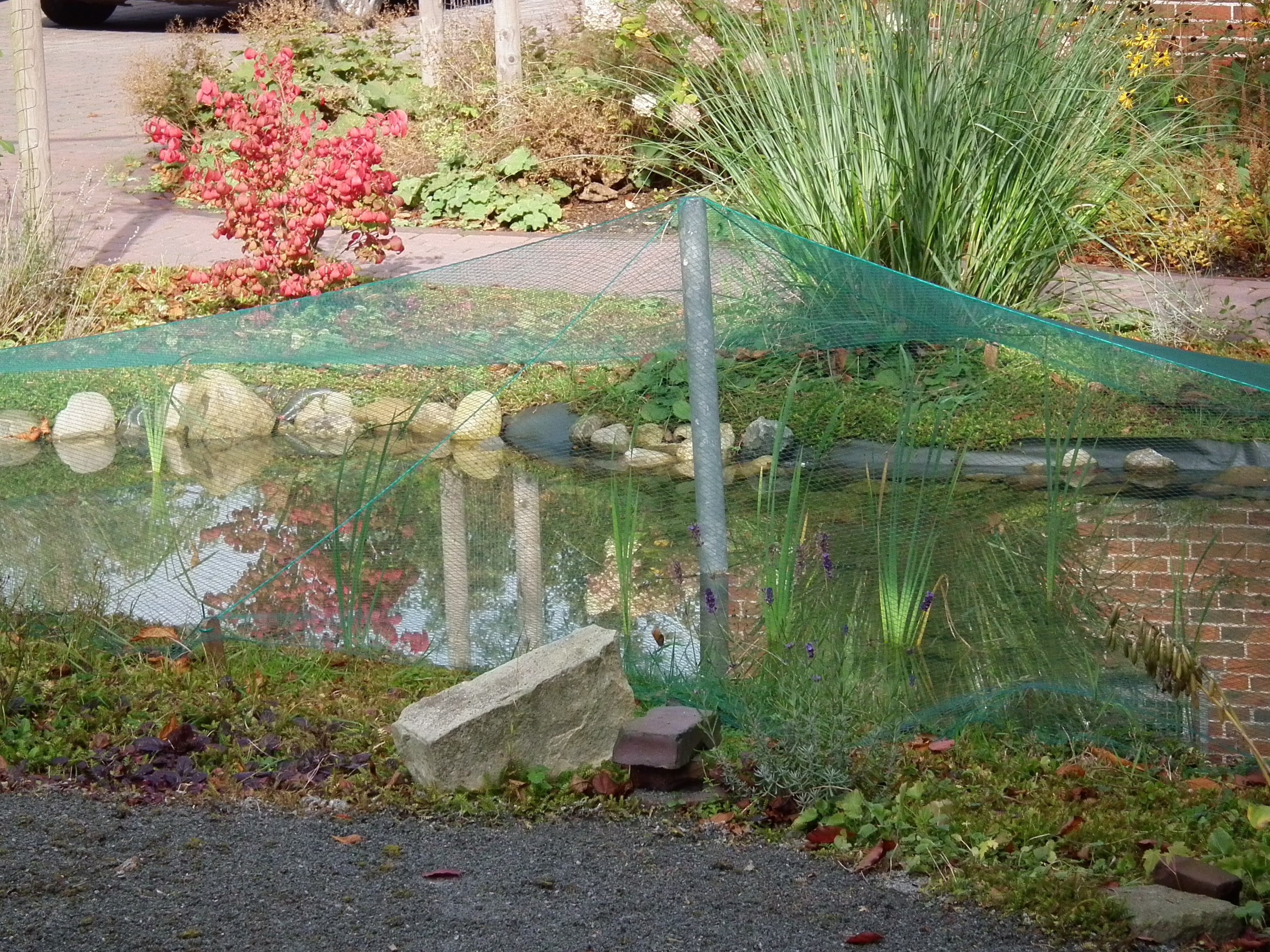 Netz über Gartenteich